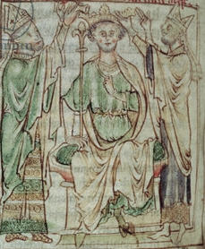 Korunovace Jana Bezzemka